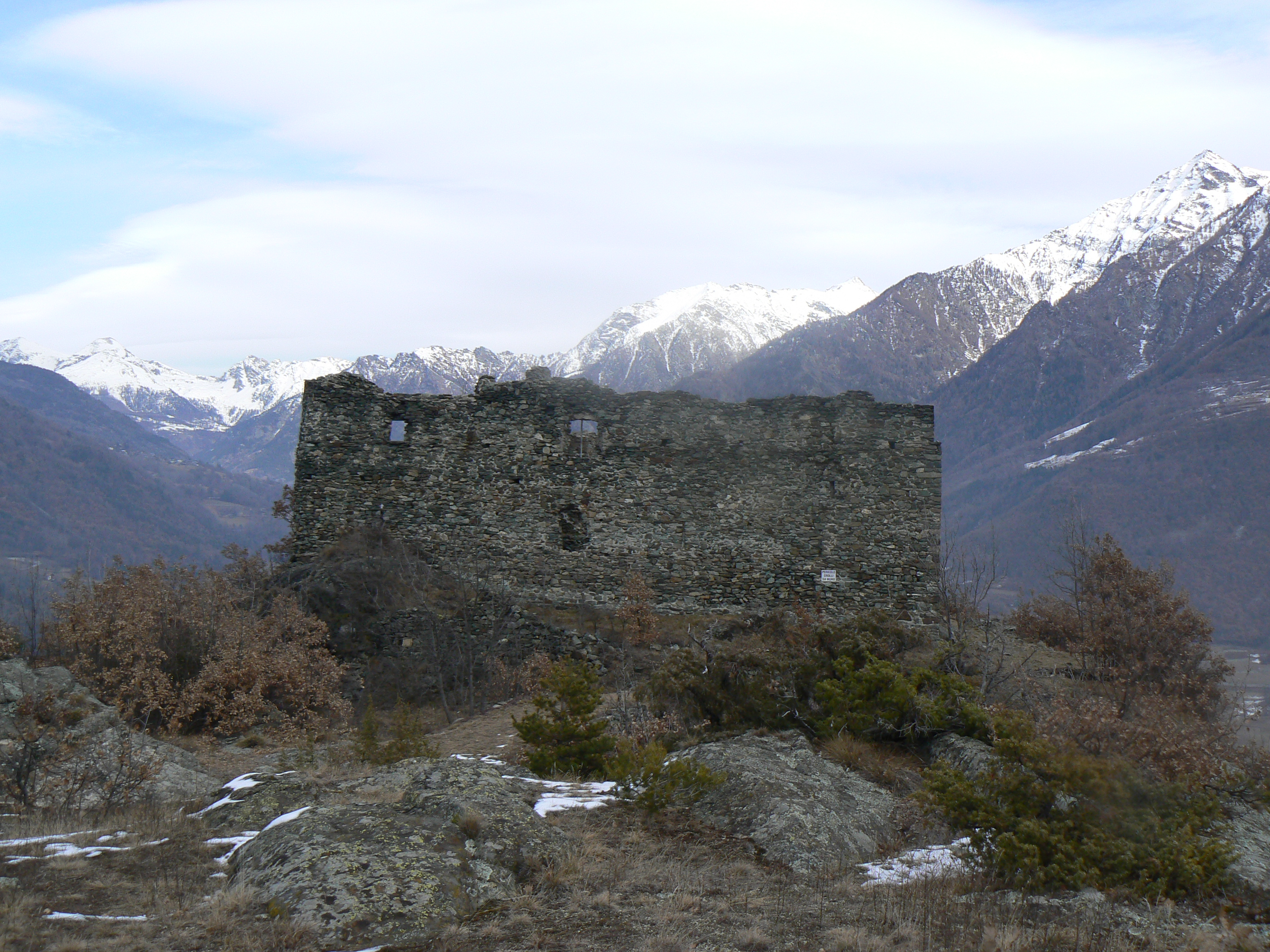 Castello di Villa, Challand-Saint-Victor, Valle d'Aosta, Italia.